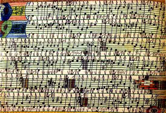 Zeichnung von Adolf Wölfli